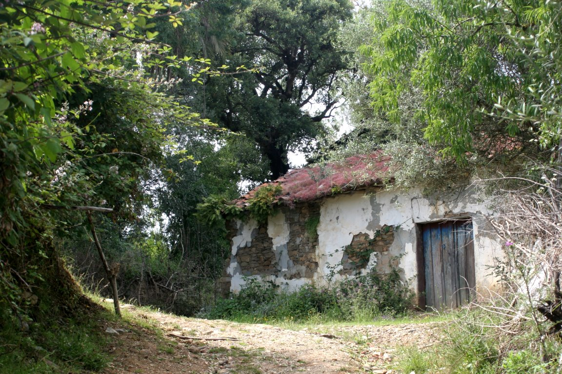 Maison de Mohamed Ben Fiala à Djemaa Beni Habibi.